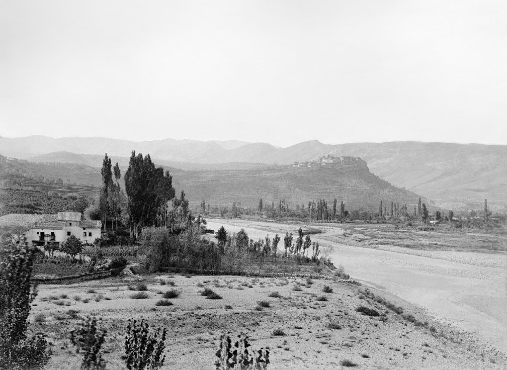 Imatge